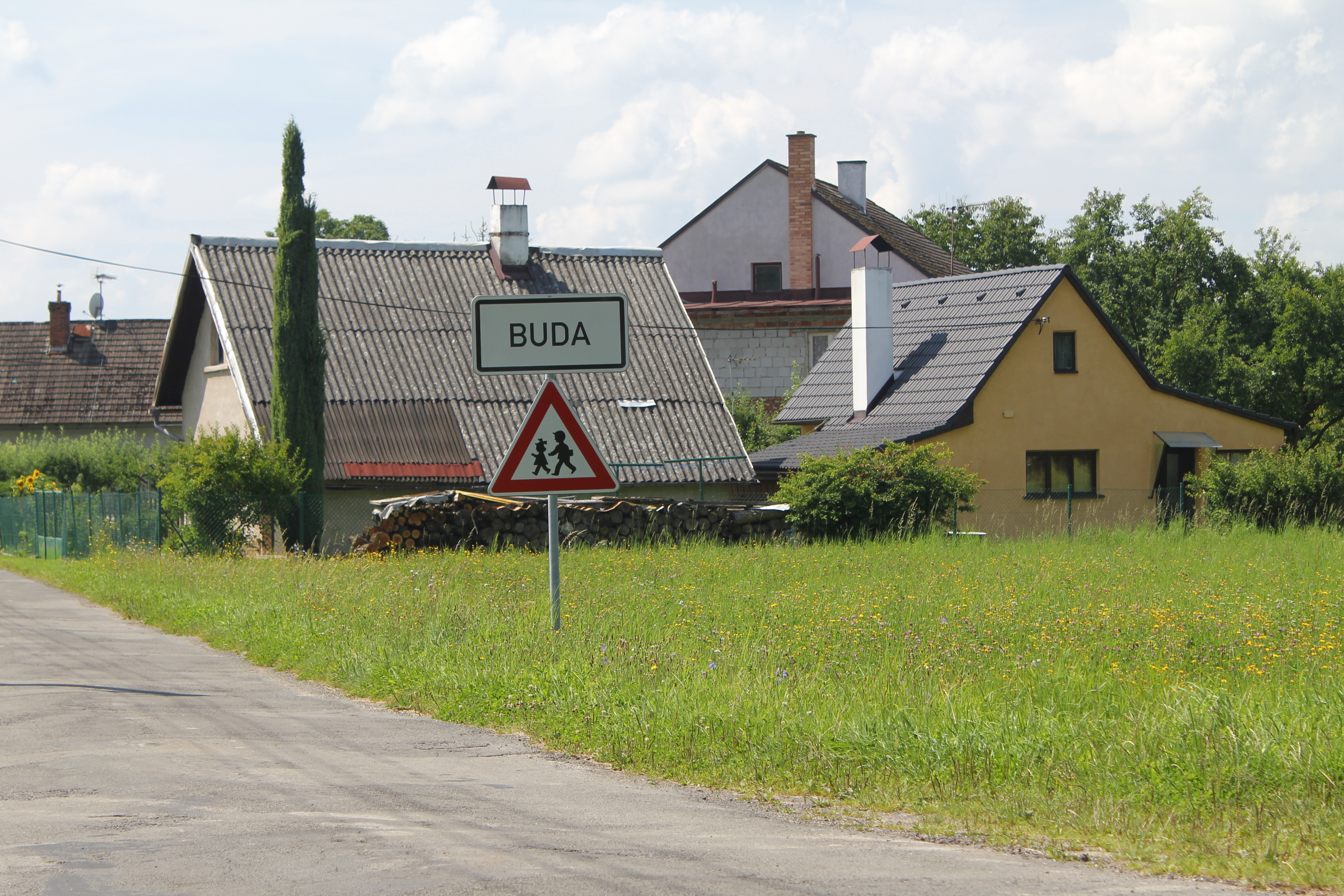 Buda, Chocnějovice